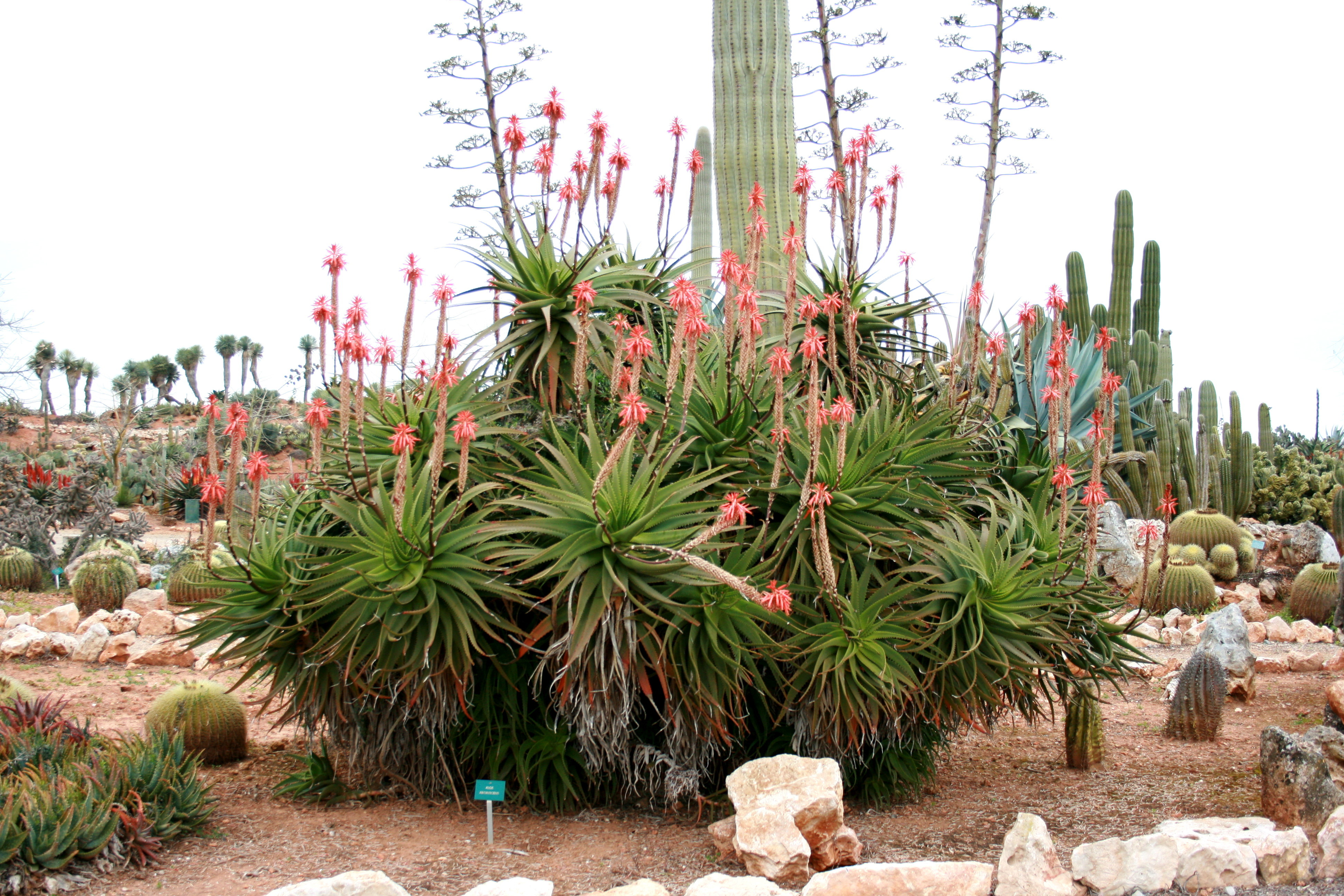 Botanicactus in Ses Salines, Mallorca, Spain